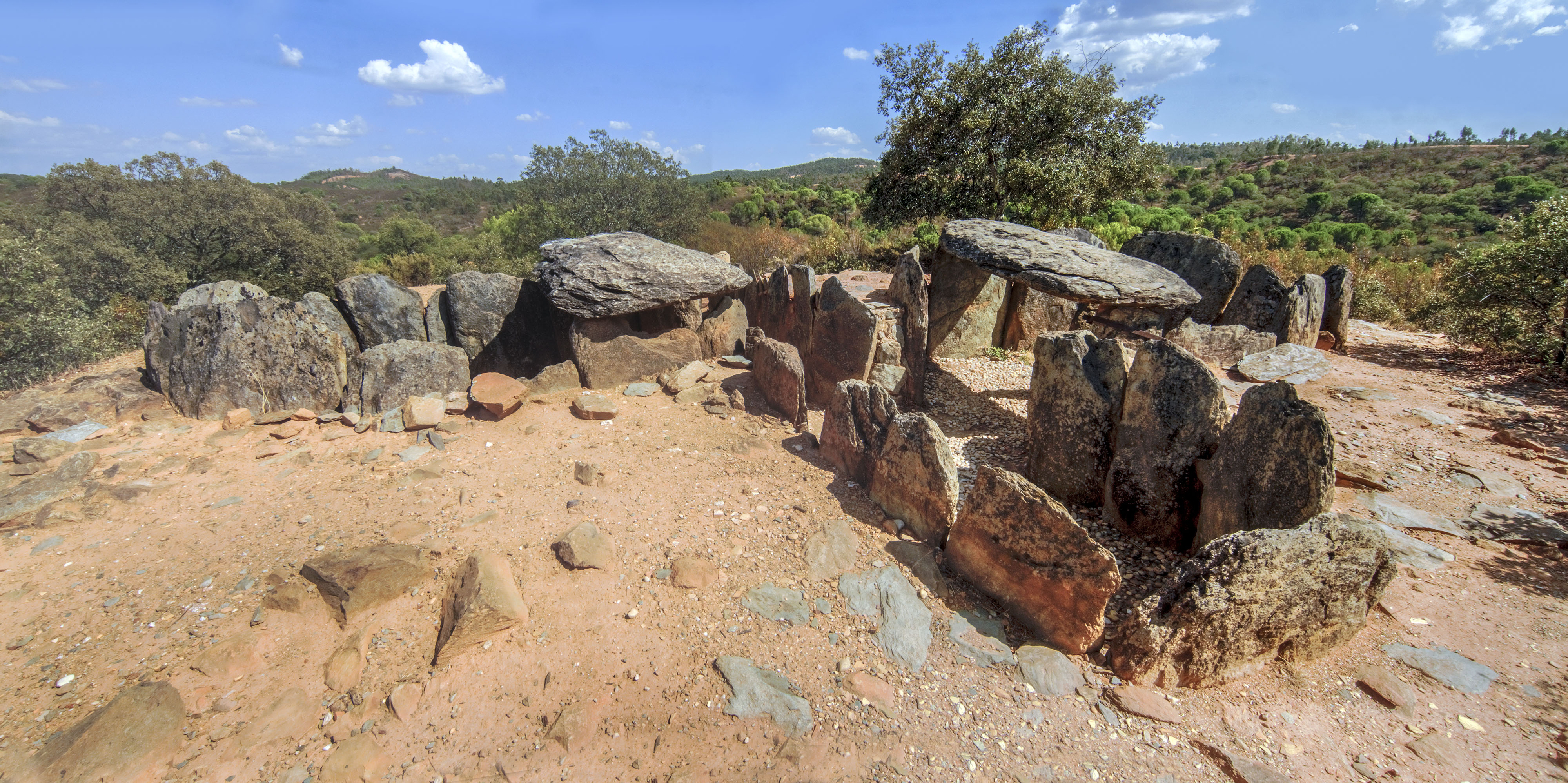 El Pozuelo, Zalamea la Real, Huelva.